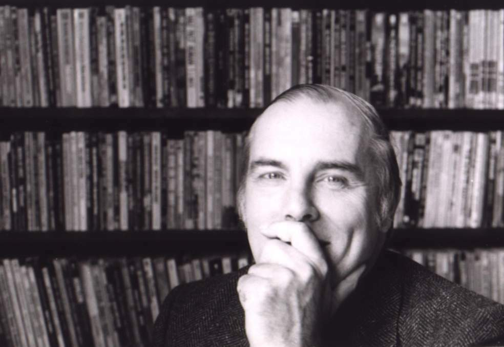 Keith Henson